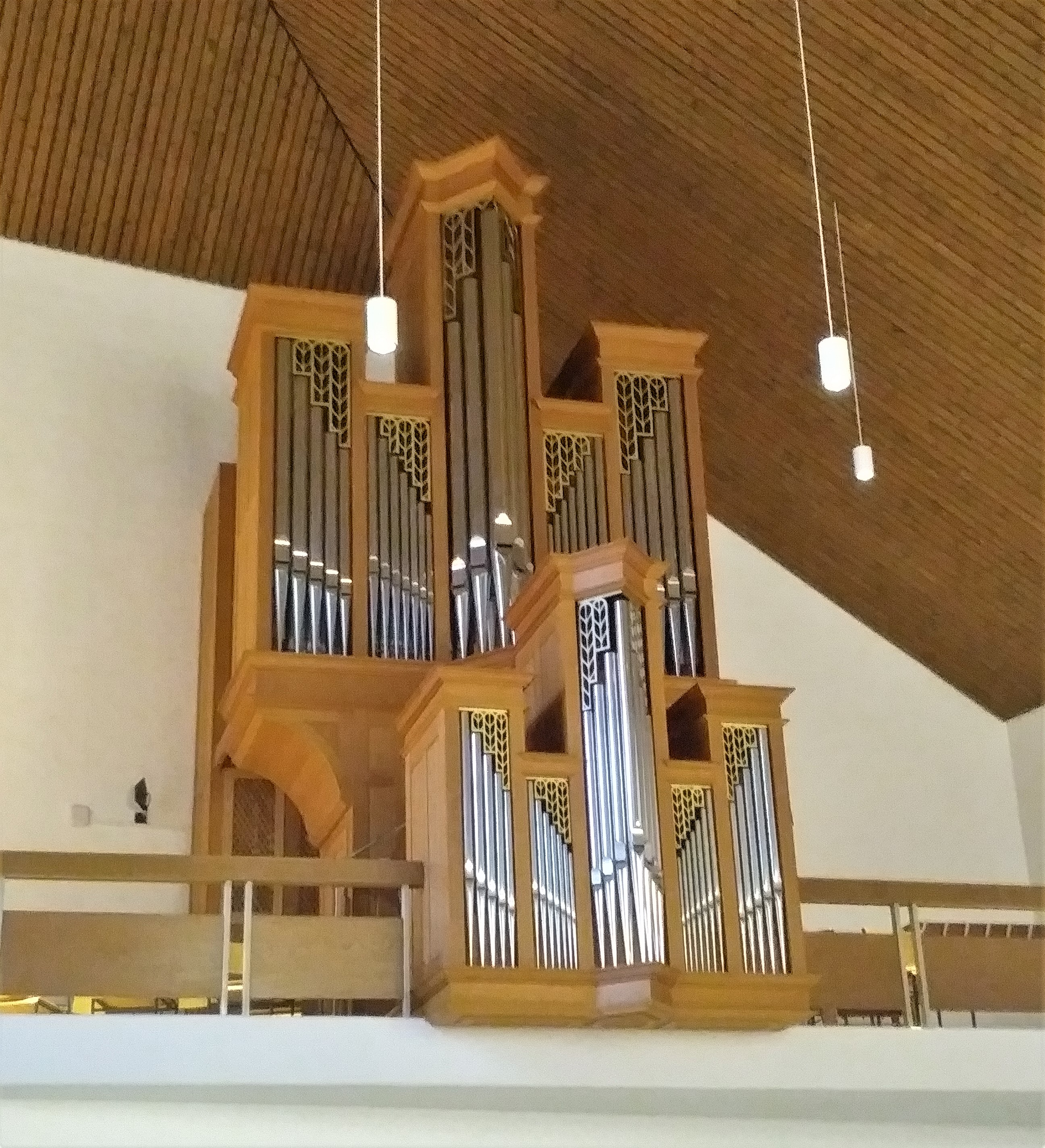 Mühleisen-Orgel in St. Bartholomäus Hasborn-Dautweiler